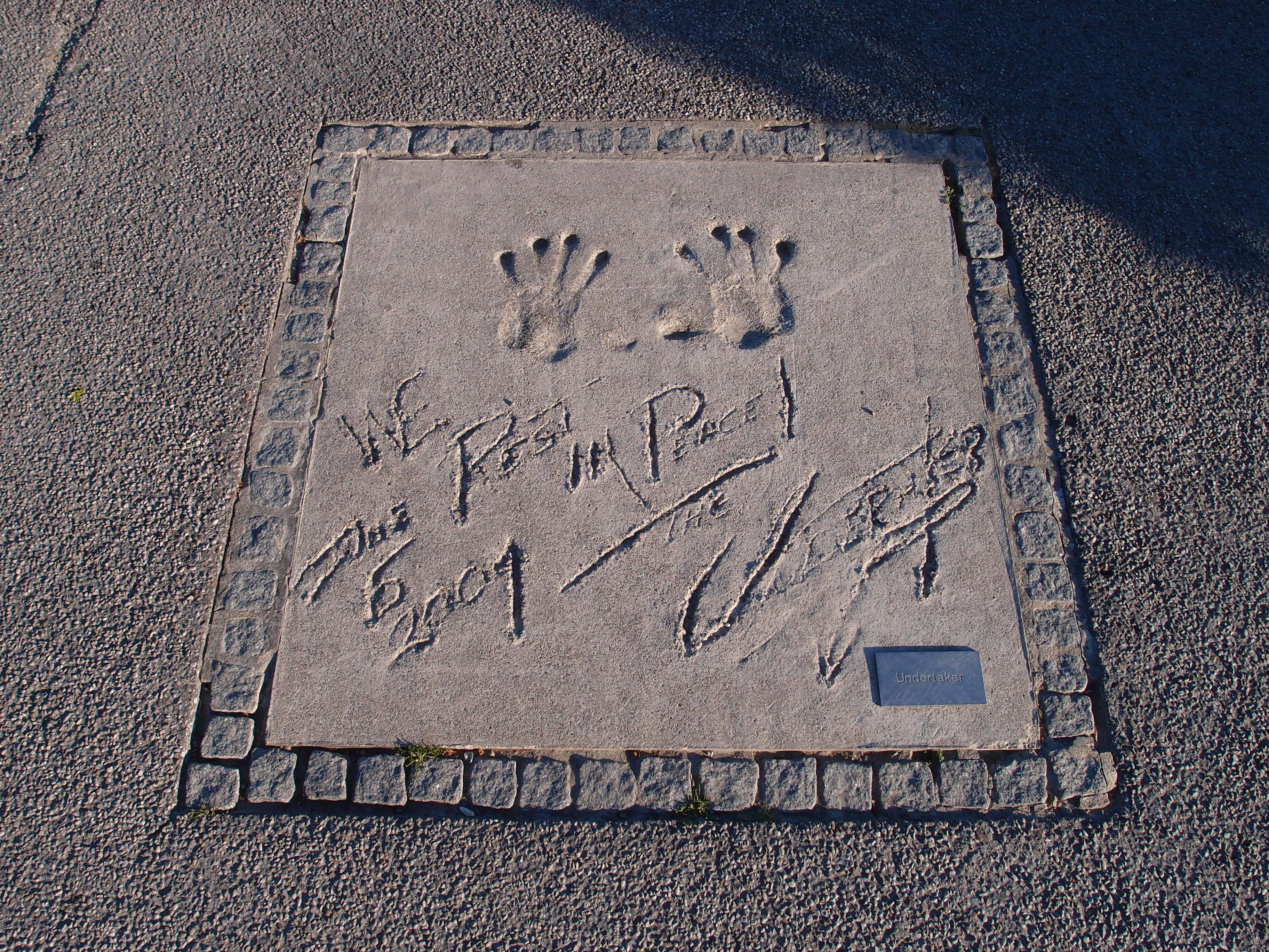 Undertaker (Handabdrücke); Munich Olympic Walk of Stars, München, Olympiapark